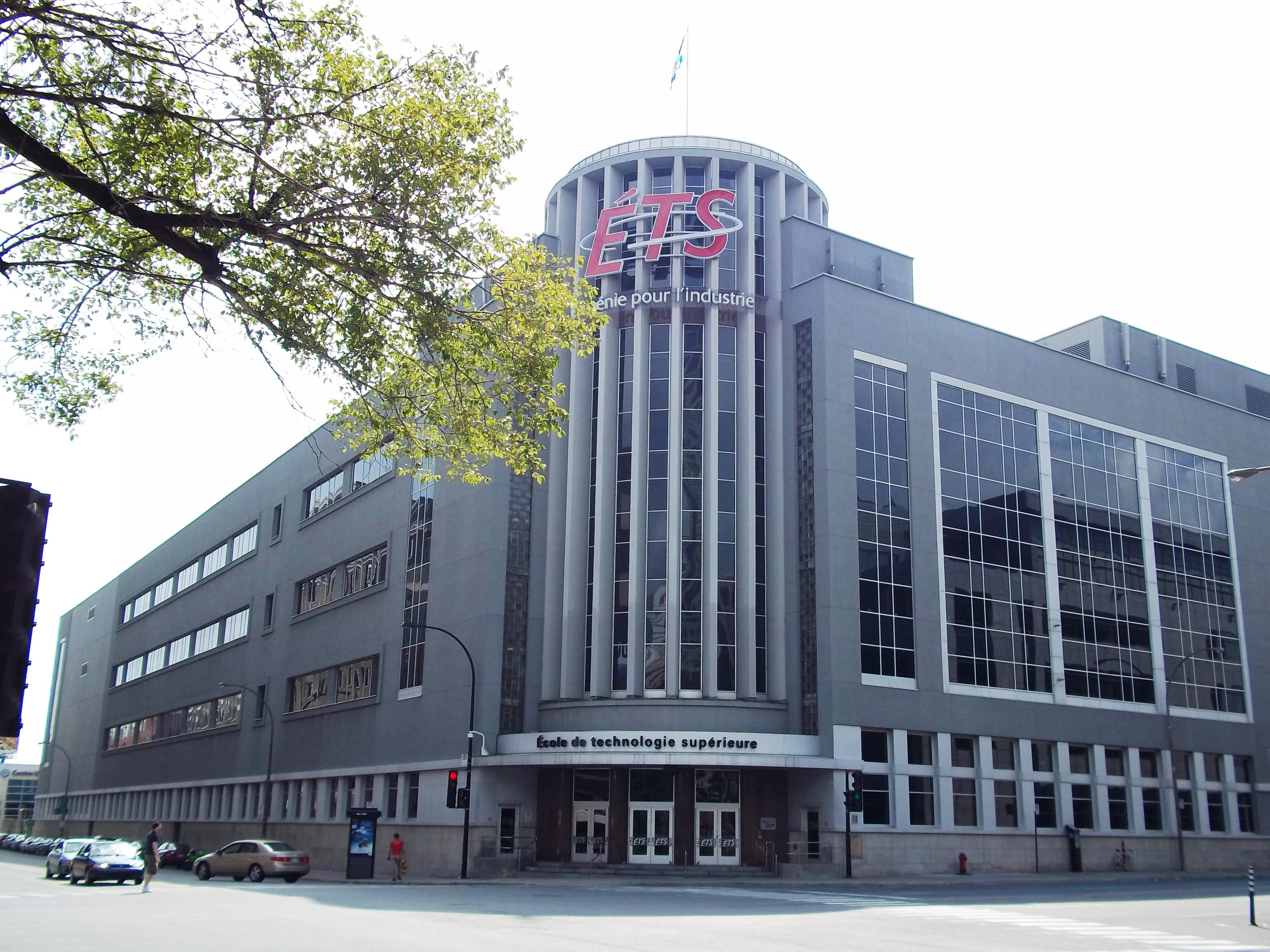 École de technologie supérieure, 1100, rue Notre-Dame Ouest, Montréal